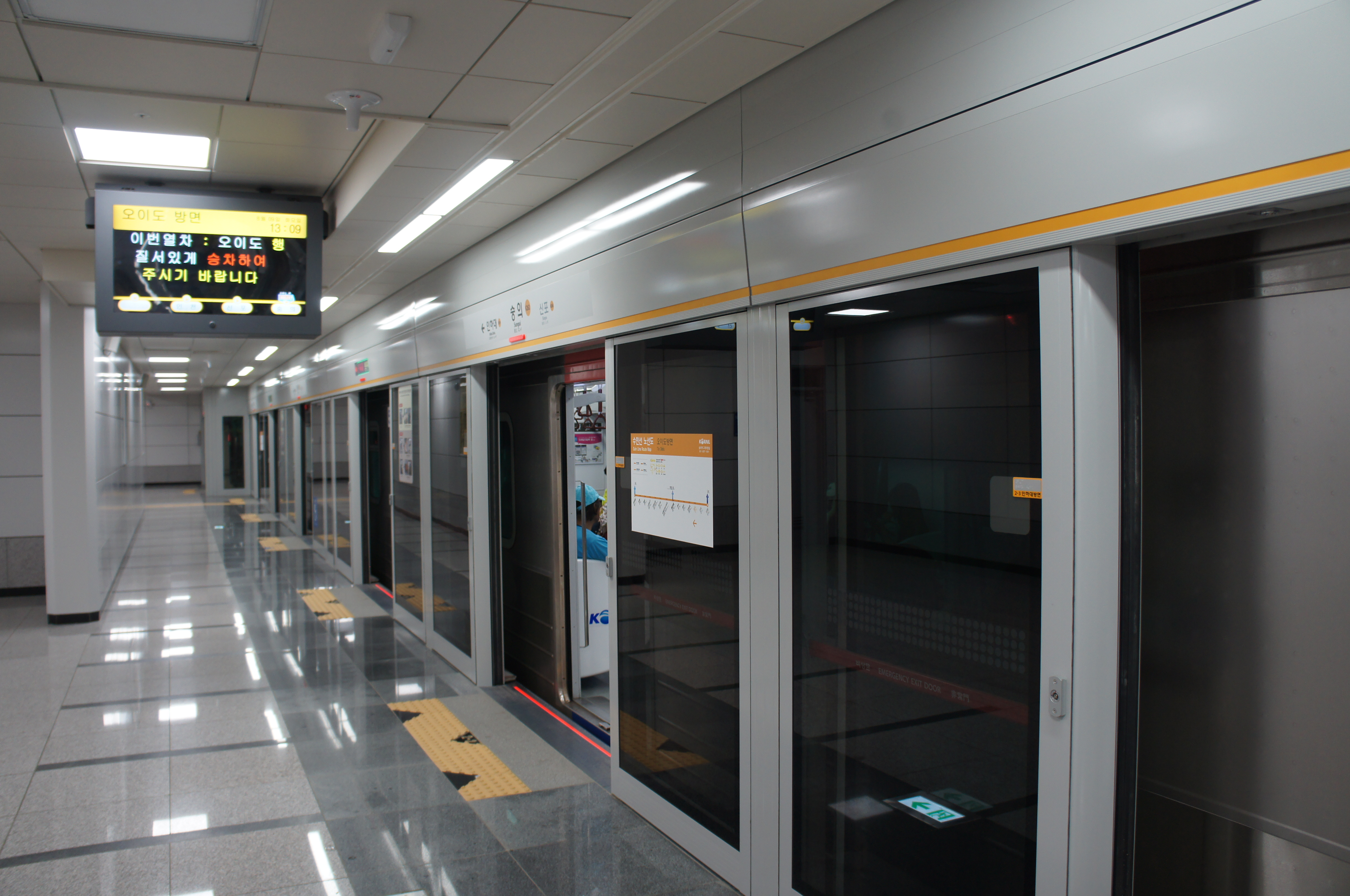 숭의역 승강장